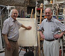 Rolf Grimm (links) gemeinsam mit dem Künstler Karl-Henning Seemann